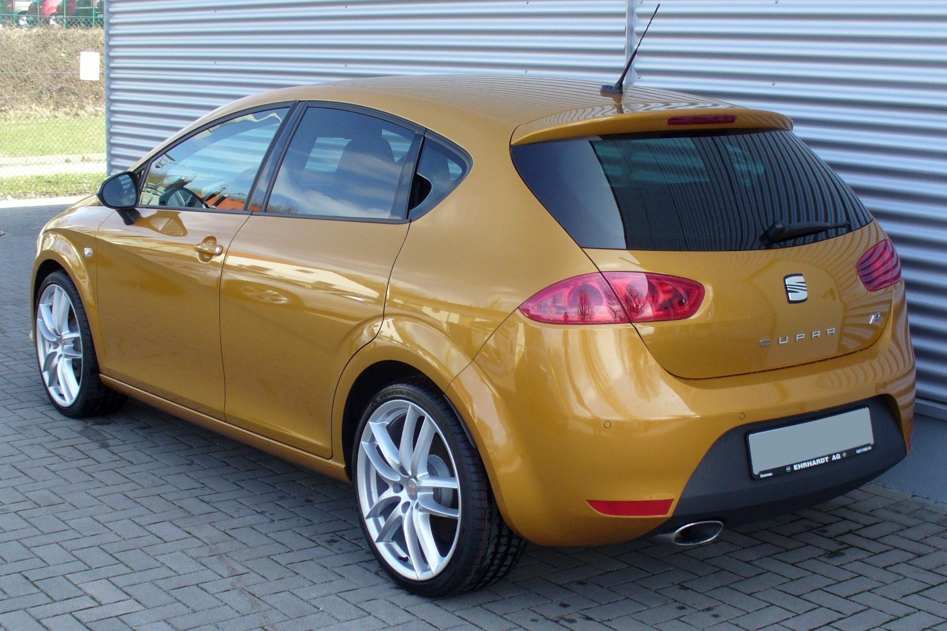 Seat Leon Cupra R